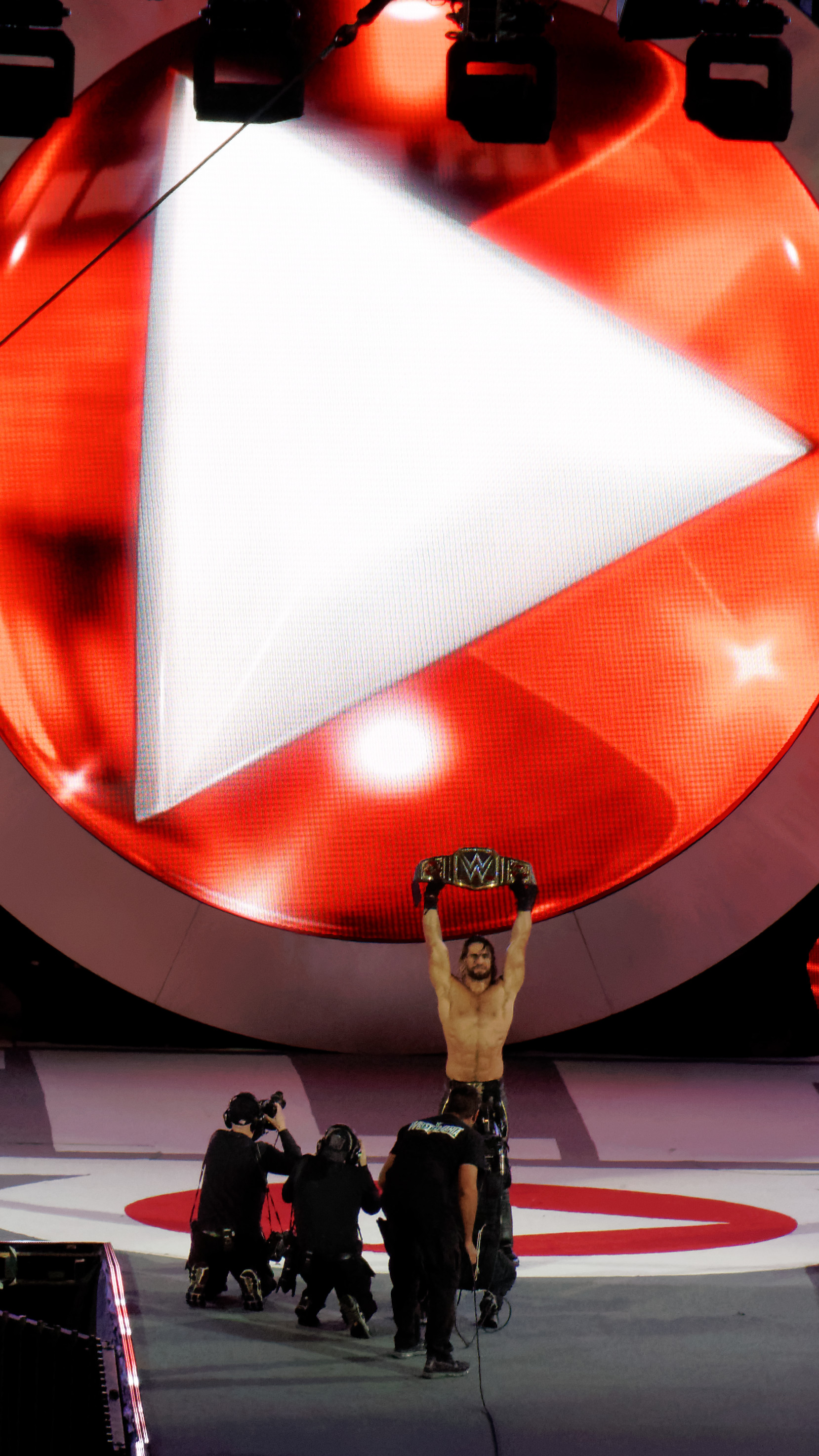 2015-03-29_19-58-43_ILCE-6000_0209_DxO